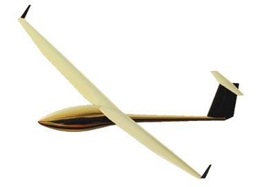 Mue31